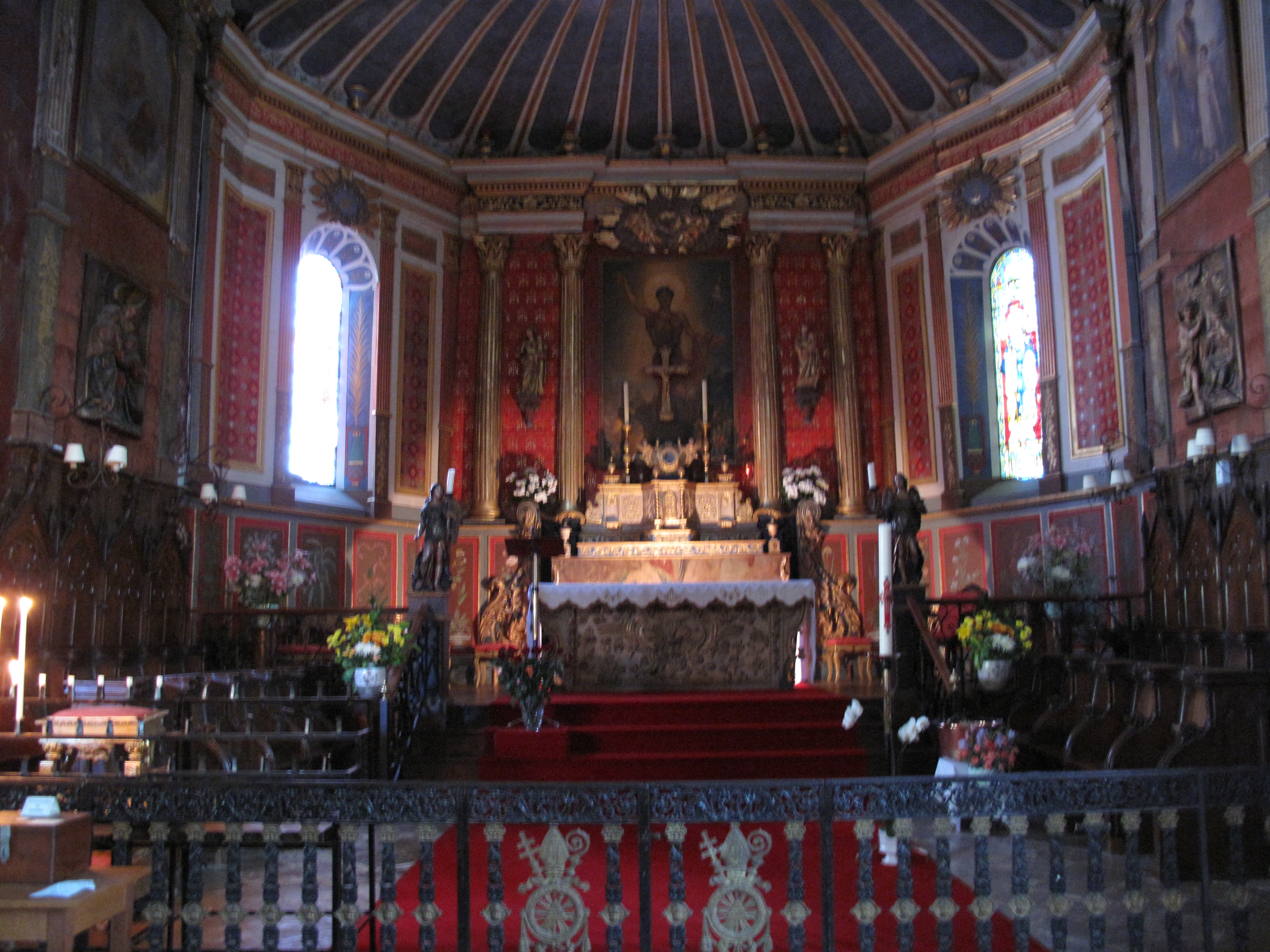 Iglesia de Arcangues, en Labort, Aquitania(Francia)